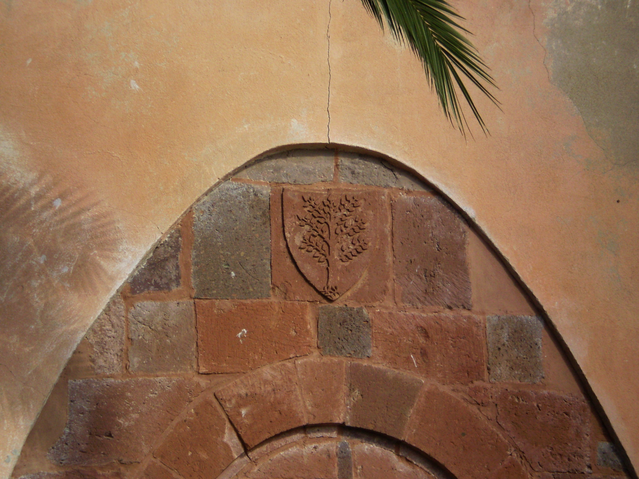 Stemma del giudicato di Arborea, chiesa di San Serafino (Ghilarza,OR)